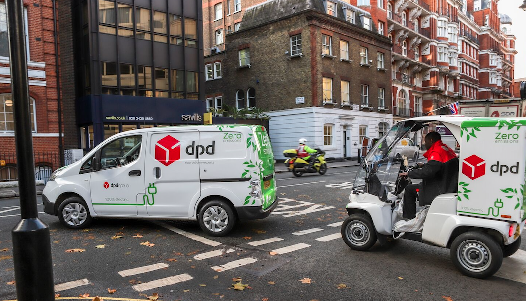 Véhicules DPDGroup